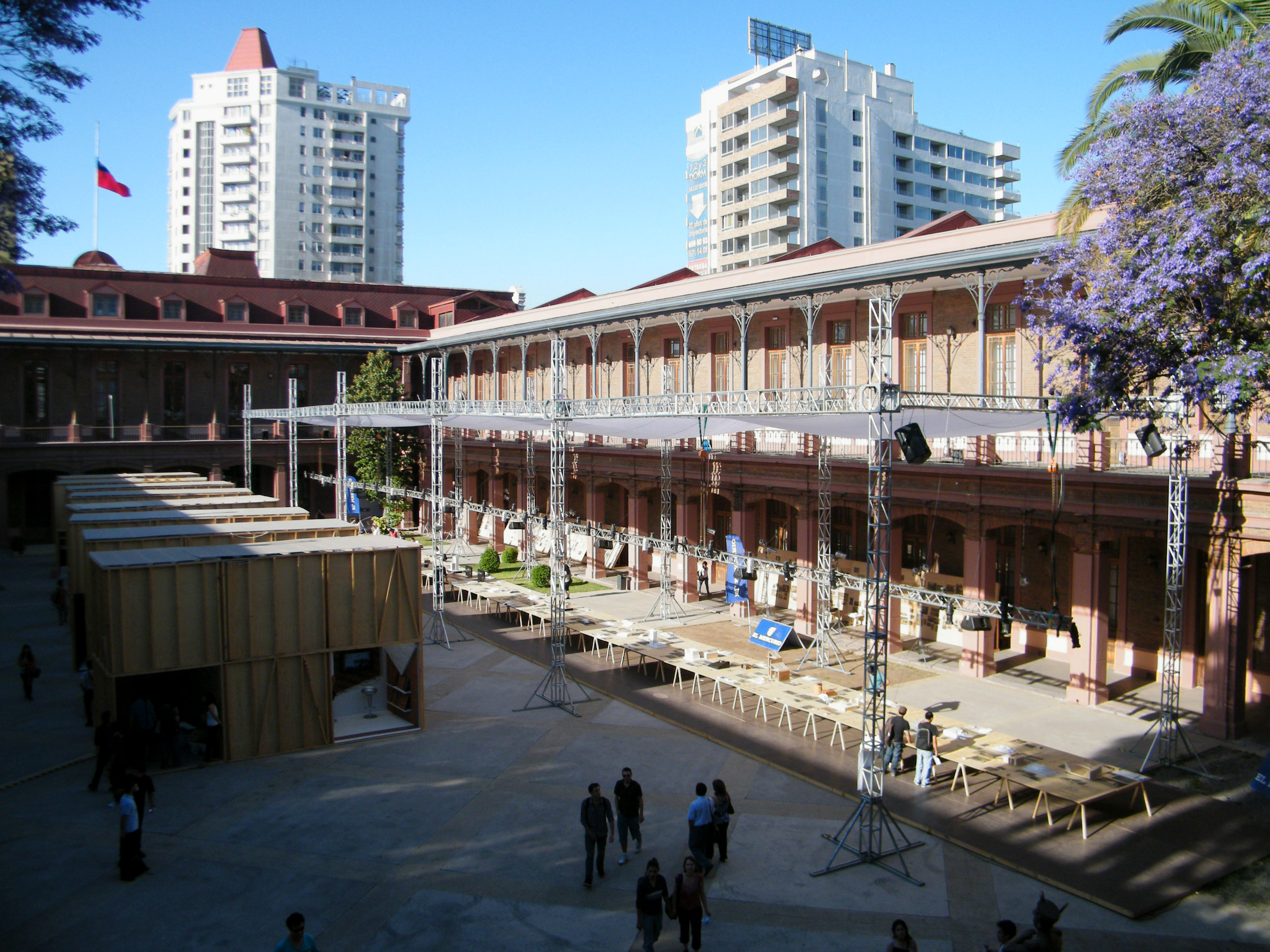 Patio de la antigua escuela militar durante el desarrollo de la Bienal de Arquitectura 2008. This is a photo of a national monument in Chile: 213